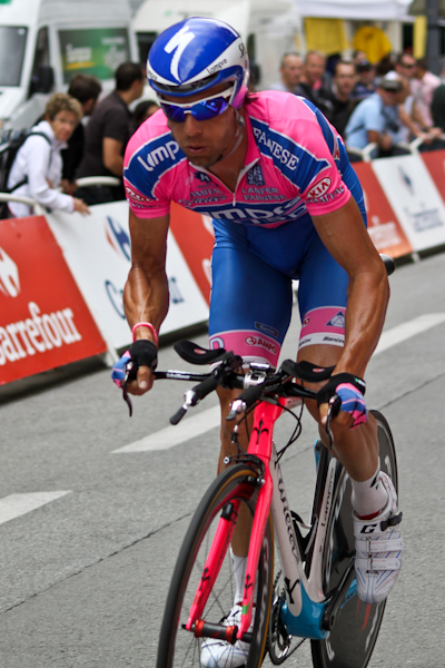 Danilo Hondo